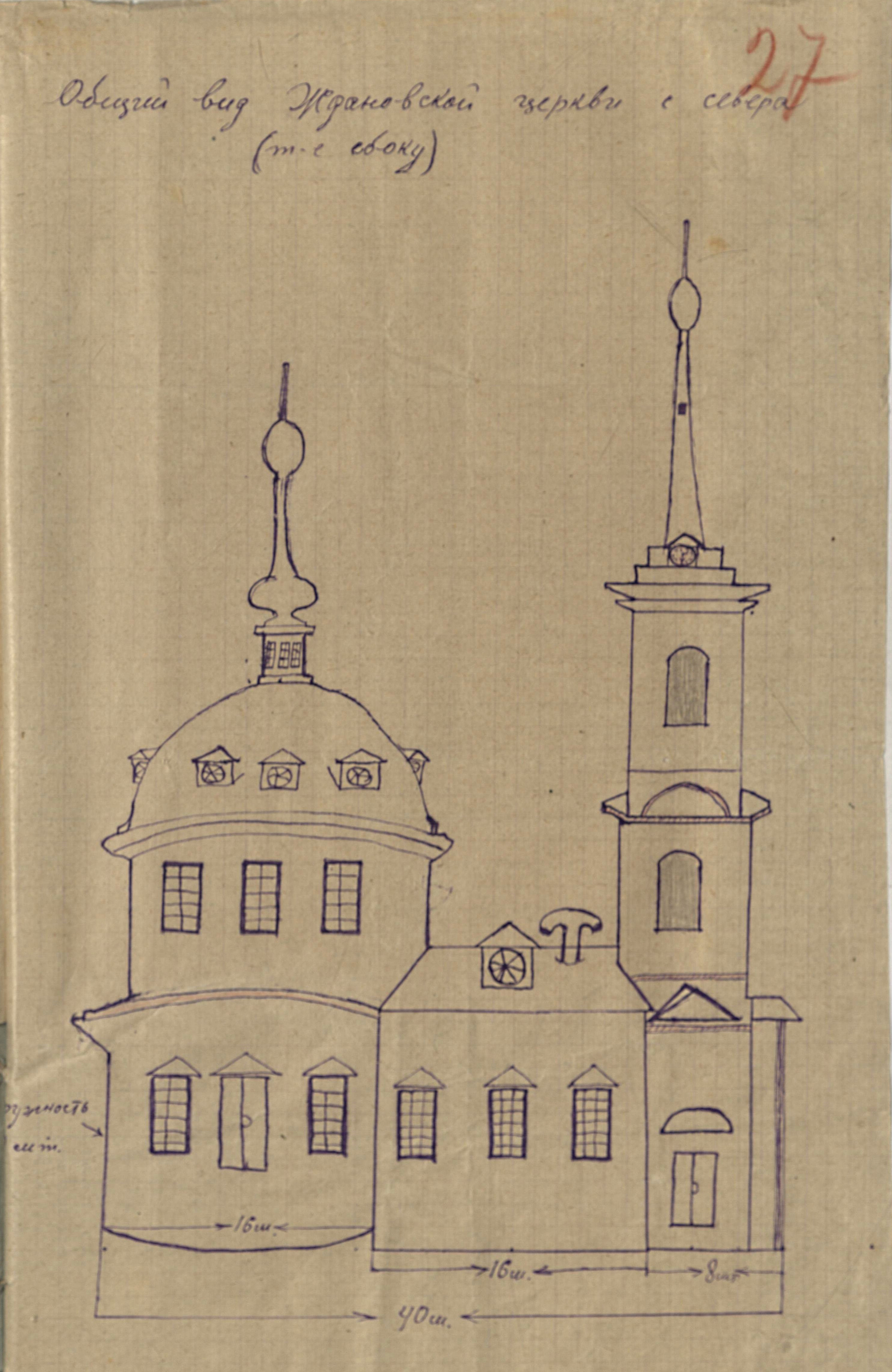 Общий вид храма Троицы Живоначальной села Жданово Пильнинского района Горьковской области